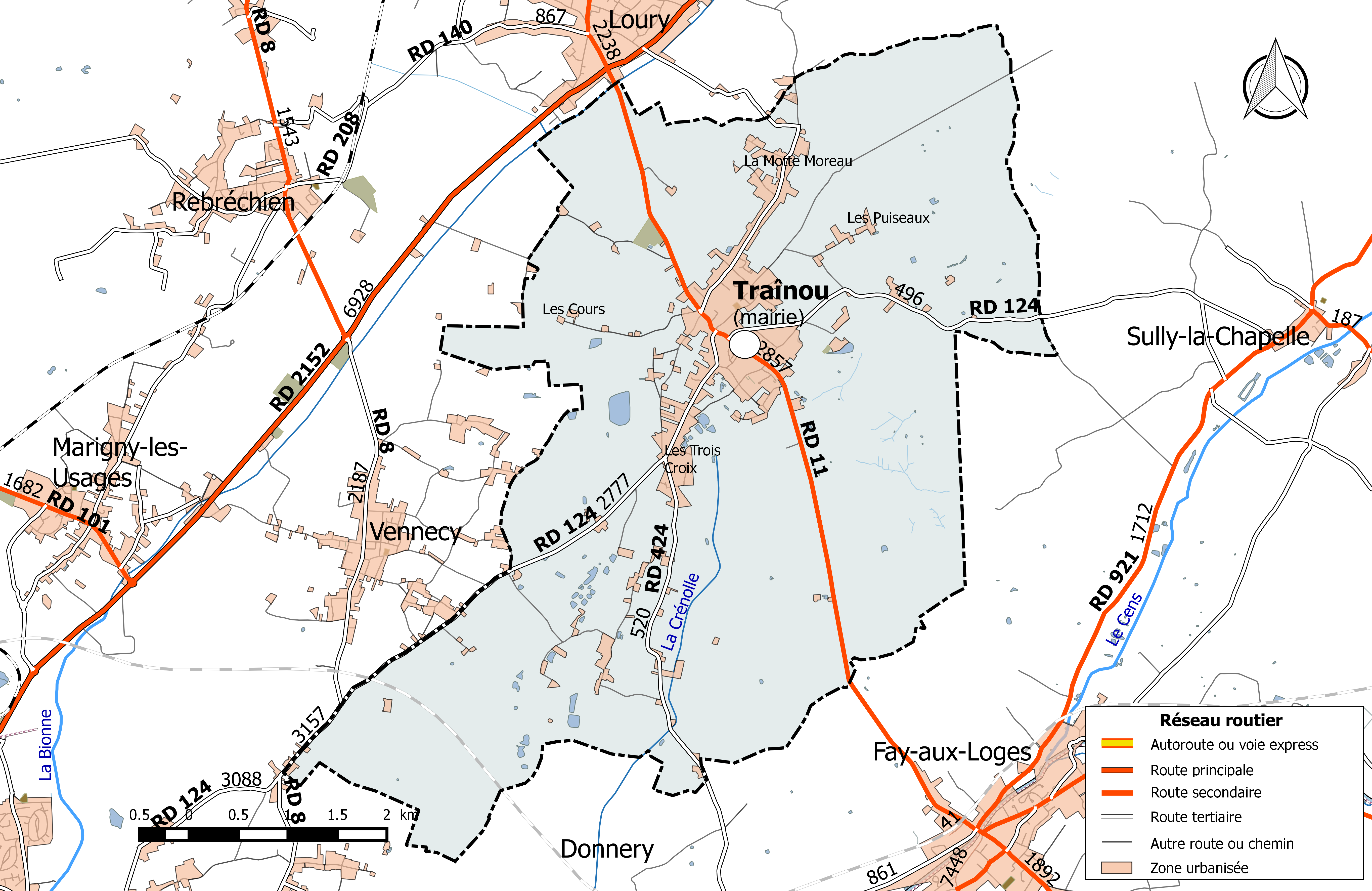 Carte du réseau routier de la commune de Traînou.